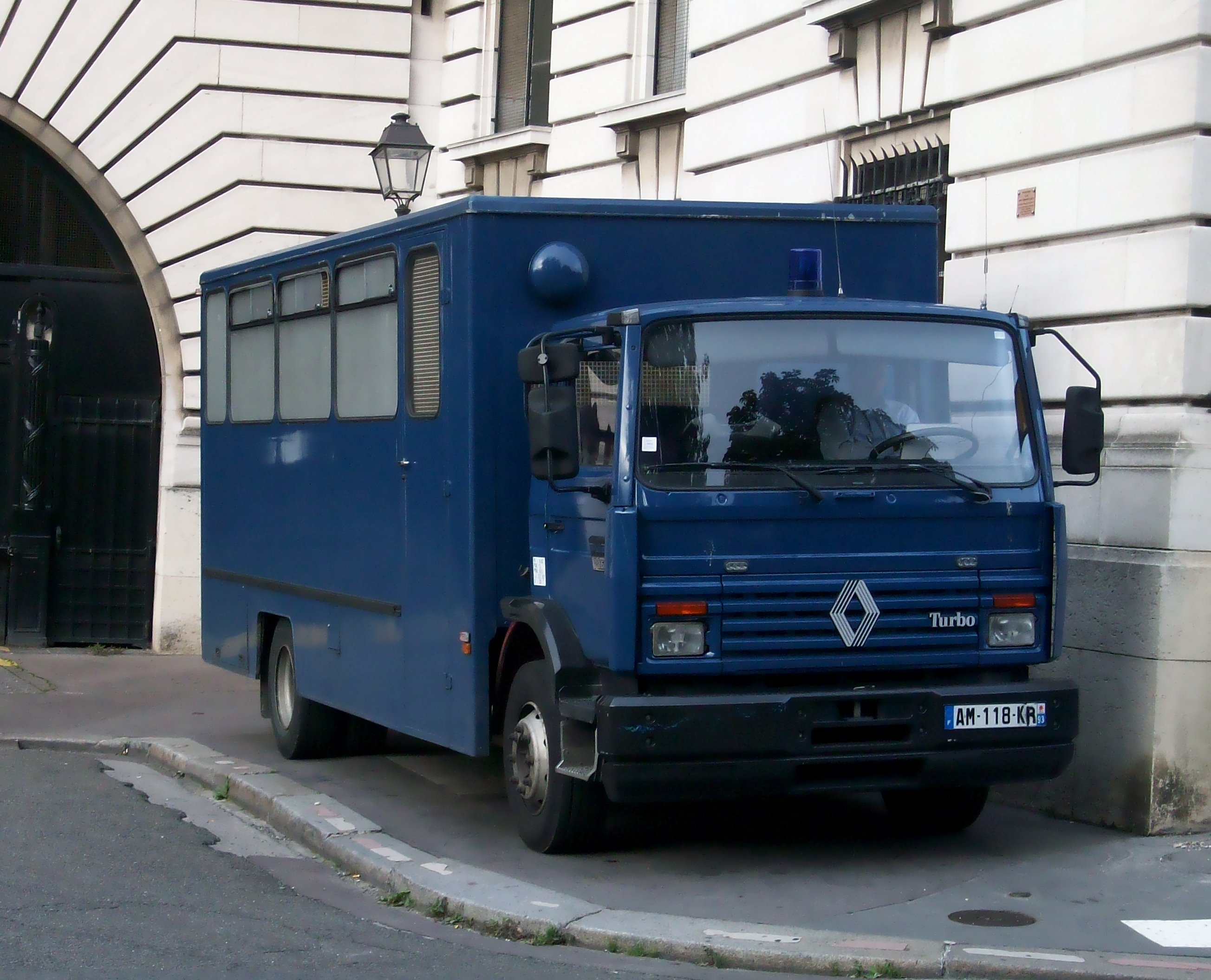 Fourgon cellulaire de la gendarmerie nationale